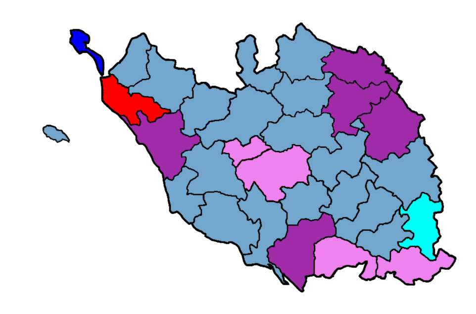 Représentation des cantons par parti politique en 2011.